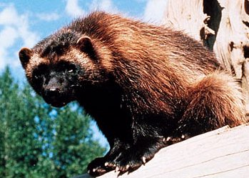 Wolverine